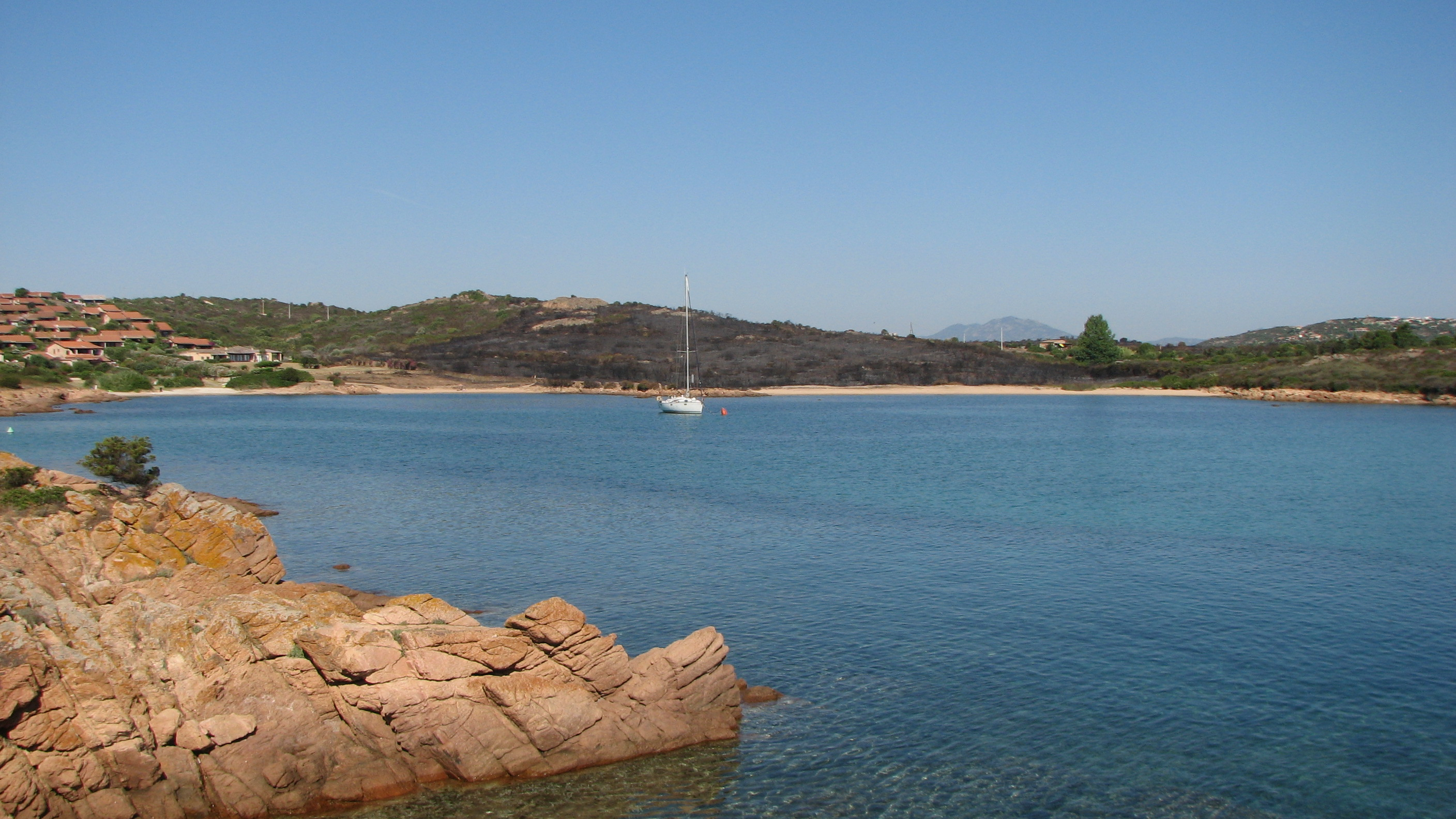 Porto San Paolo Beach